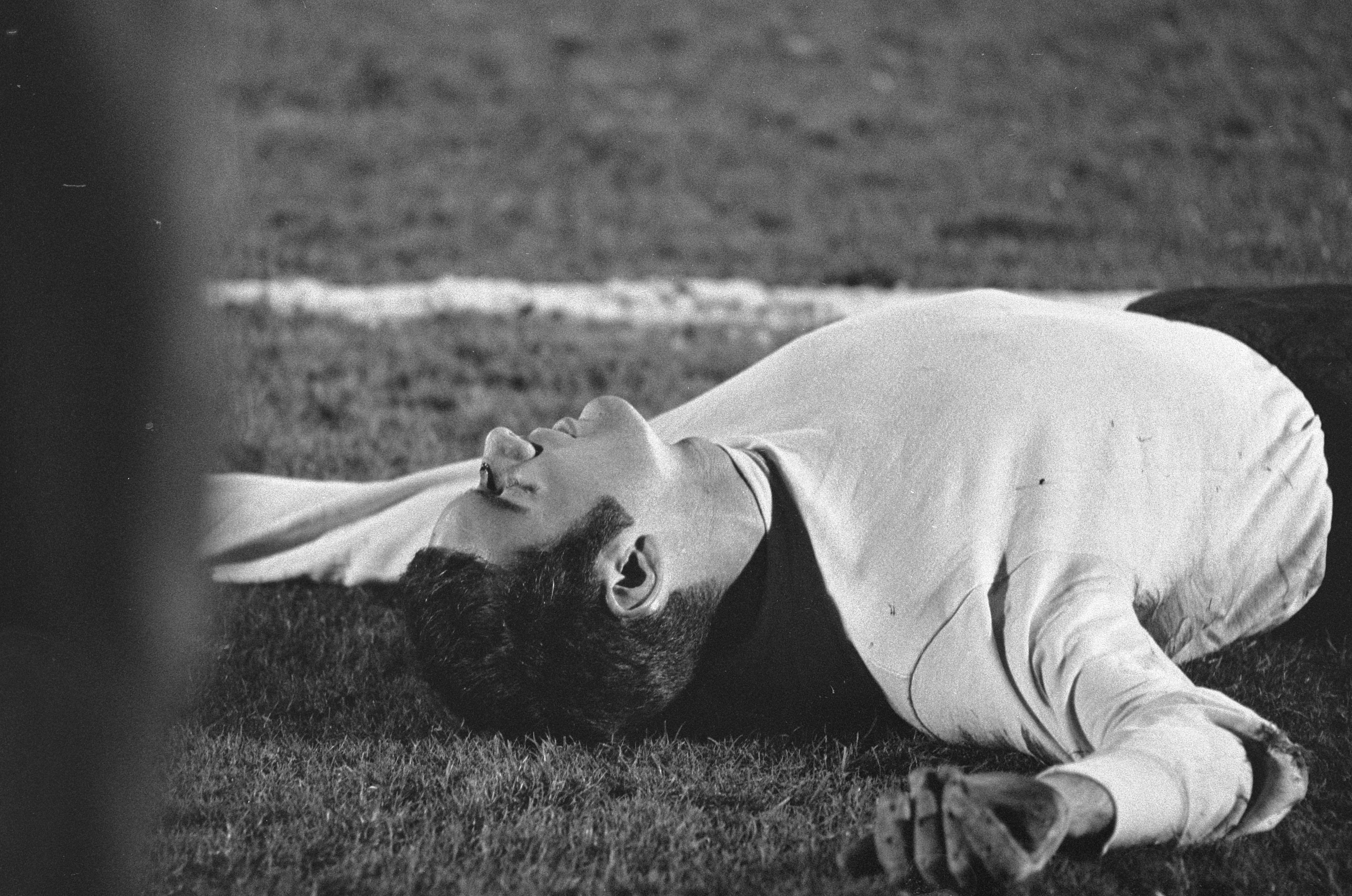 Collectie / Archief : Fotocollectie Anefo Reportage / Serie : [ onbekend ] Beschrijving : FC Koln-ADO 3-0, om Europacup II keeper Heyeres van Koln ligt gewond op de grond Datum : 27 november 1968 Trefwoorden : keepers, sport, voetbal Persoonsnaam : Koln Instellingsnaam : ADO Fotograaf : Kroon, Ron / Anefo Auteursrechthebbende : Nationaal Archief Materiaalsoort : Negatief (zwart/wit) Nummer archiefinventaris : bekijk toegang 2.24.01.05 Bestanddeelnummer : 921-8929